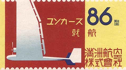 Luggage Tag from Manchukuo National Airways